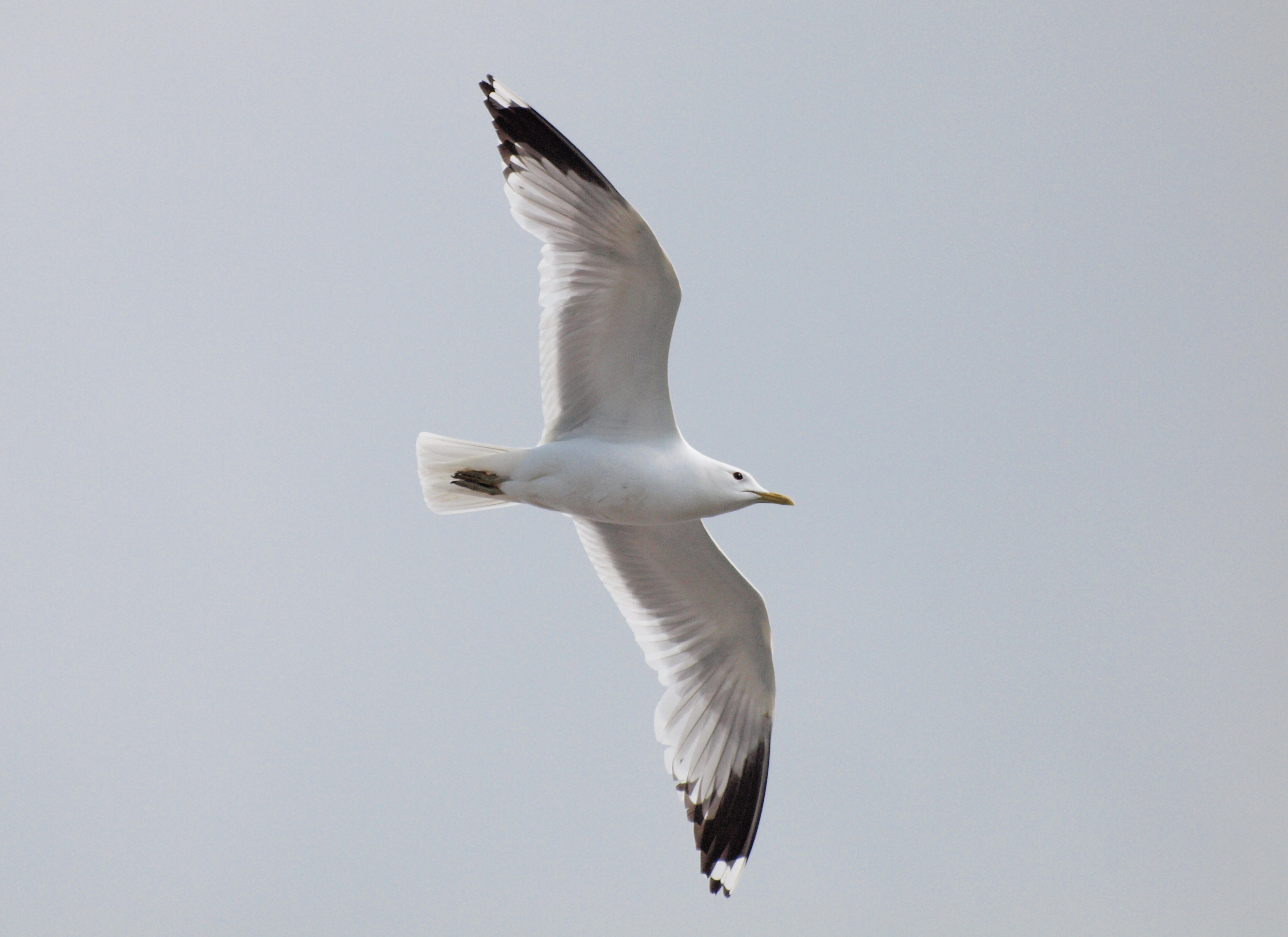 Larus canus, Hallsberg, Orebro, Sweden.